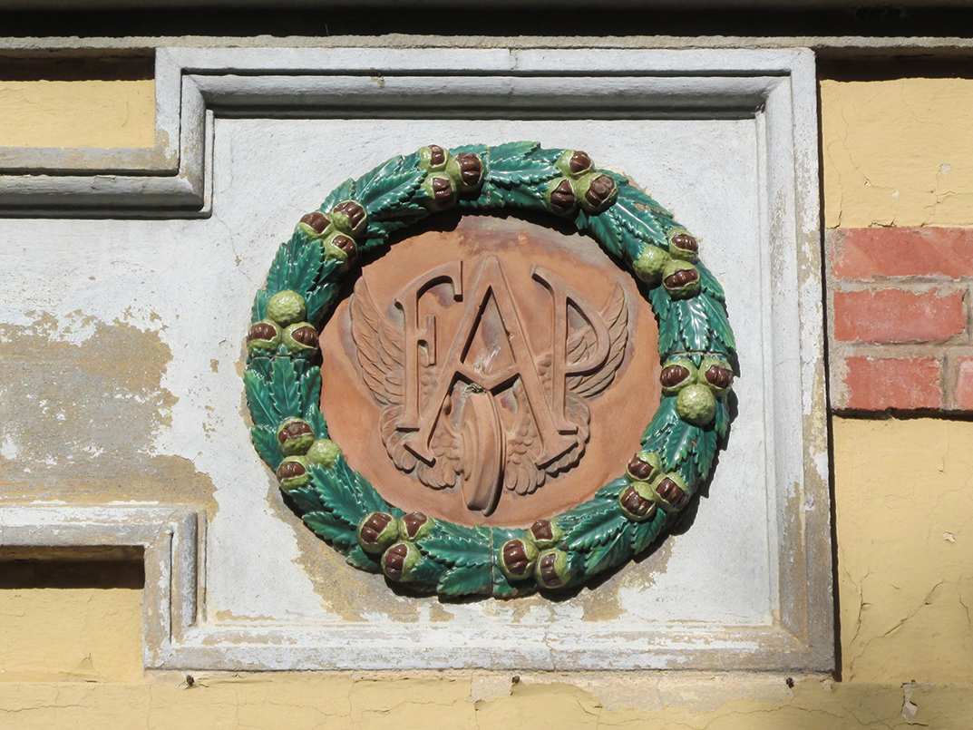 Logo della Ferrovia Alto Pistoiese in ceramica invetriata sulla facciata della stazione di Pracchia